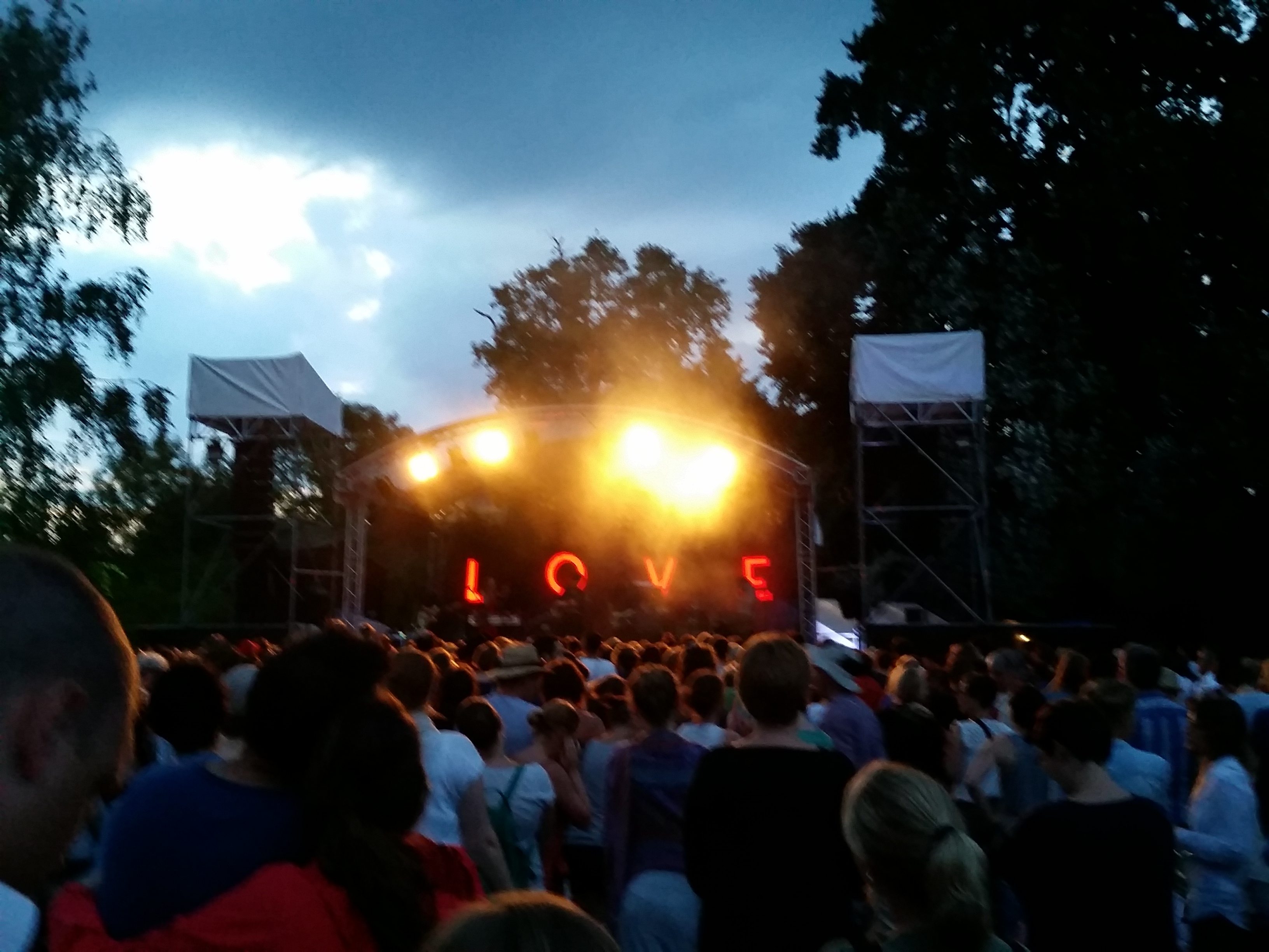 Konzert der Band Get Well Soon auf dem Heimspiel Knyphausen 2016